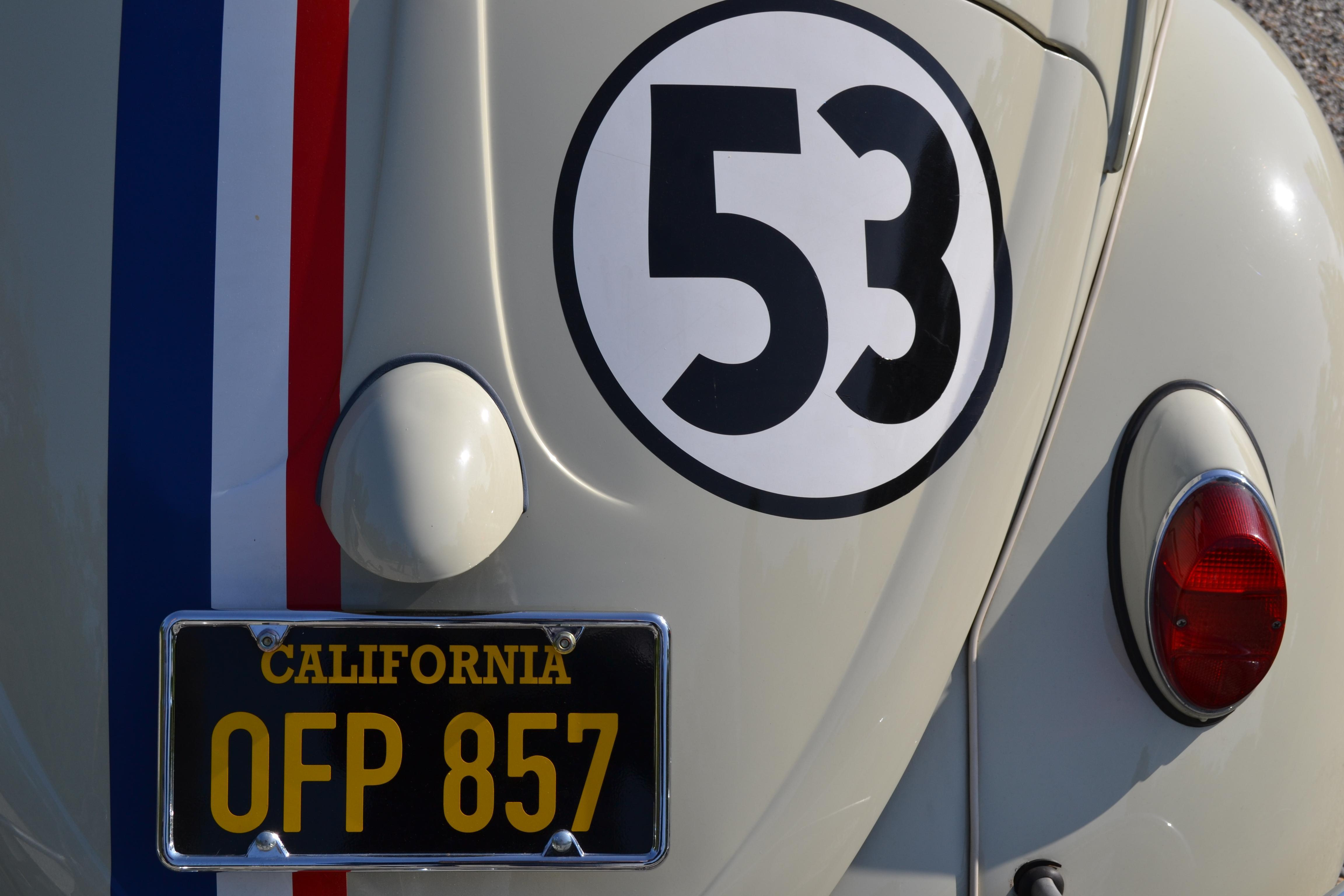 Foto del retro di una riproduzione di Herbie